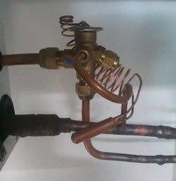 Válvula de expansión termostática